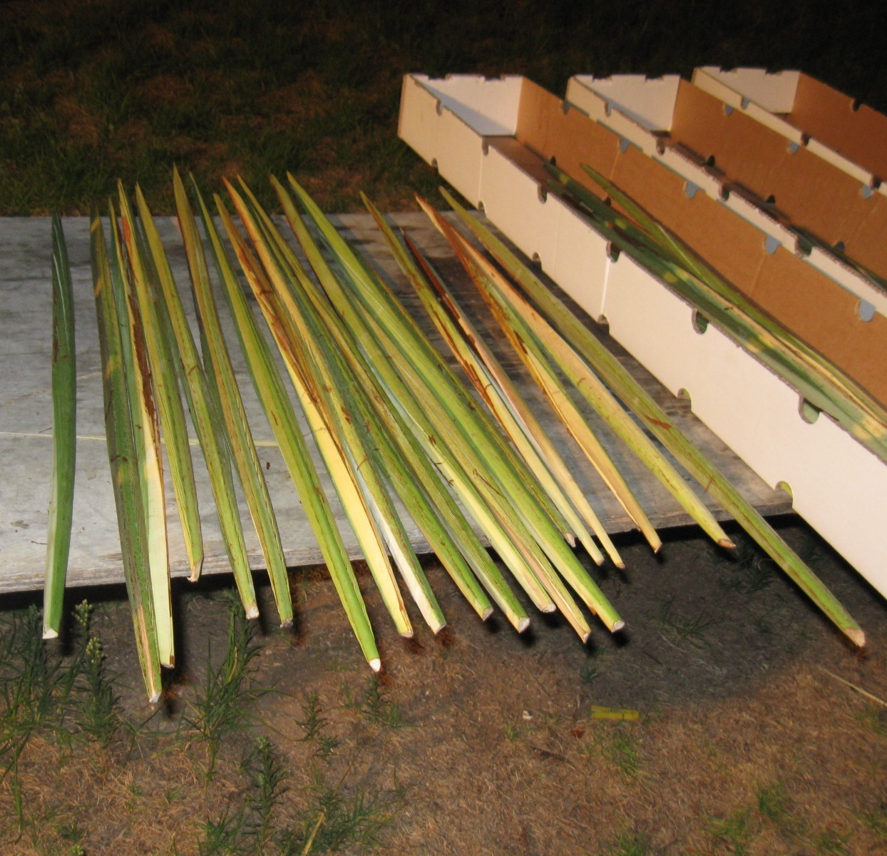 דוכן יוני ויאיר מרדכי קדומים תש"ע רישיון נוצר על ידי משתמש:Daniel Ventura